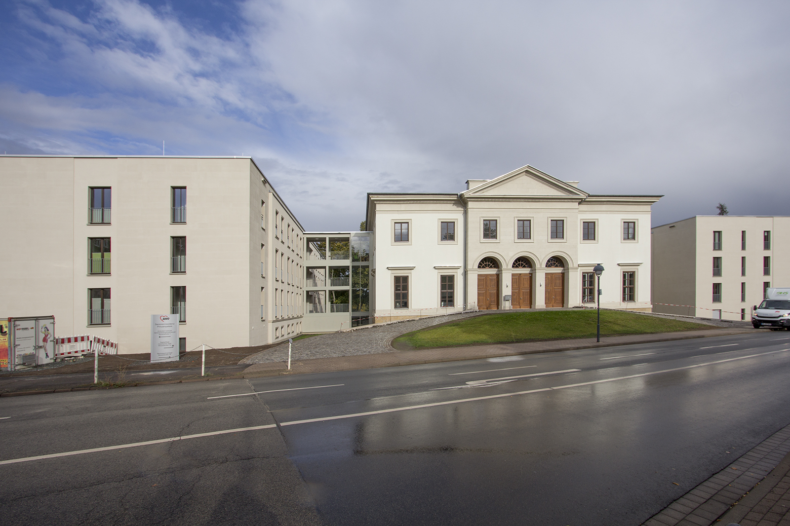 Gotha, Prinzenpalais (2019)